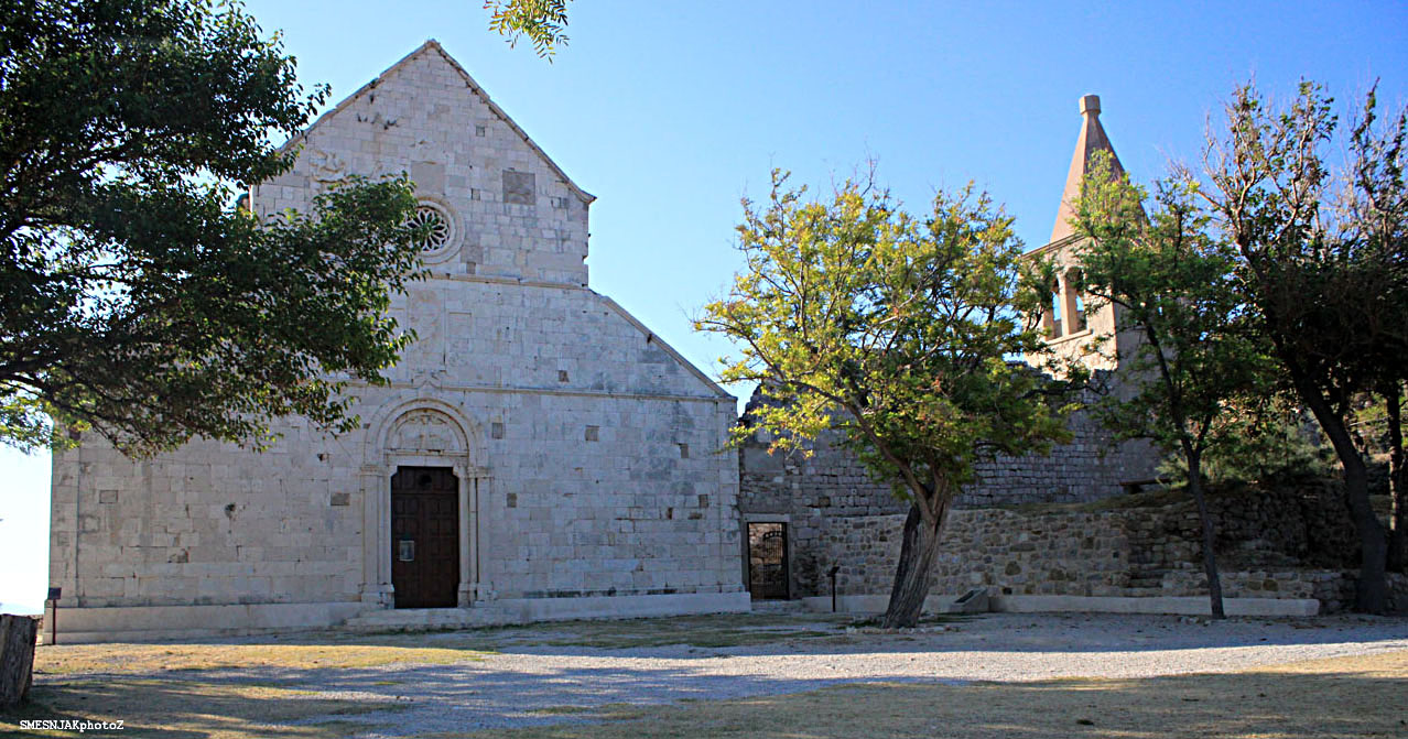 Crkva Marijina Uznesenja u Starom Pagu